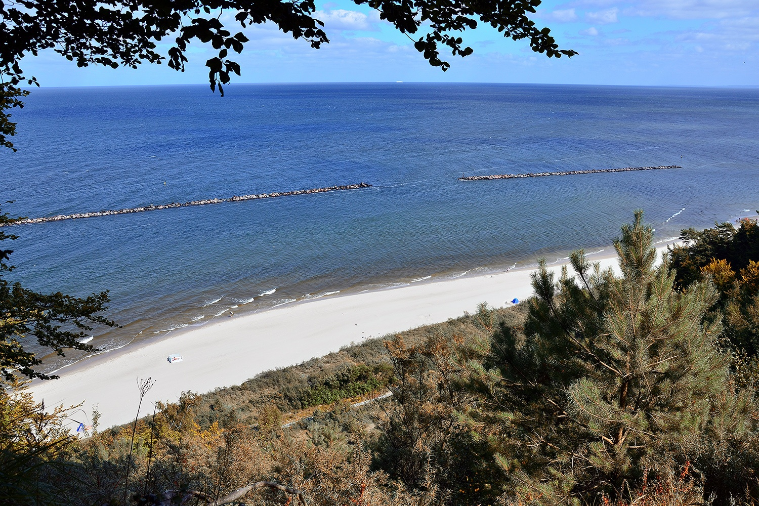 Koserow, Usedom, Datum/Uhrzeit: 27.08.2012 14:04:12